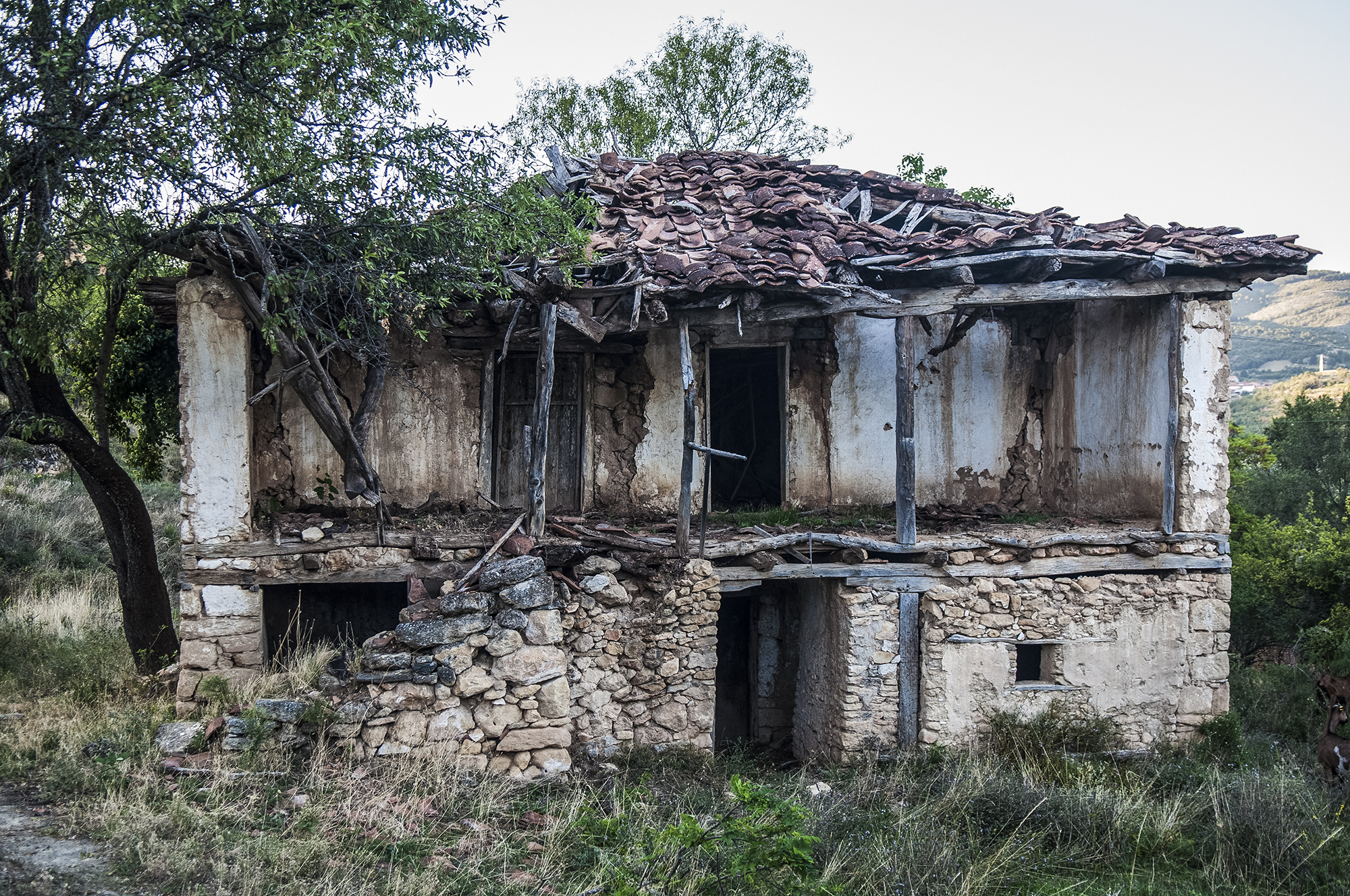 Интересна камена архитектура на куќите во Говрлево, повеќето се напуштени и обраснати со зеленило.